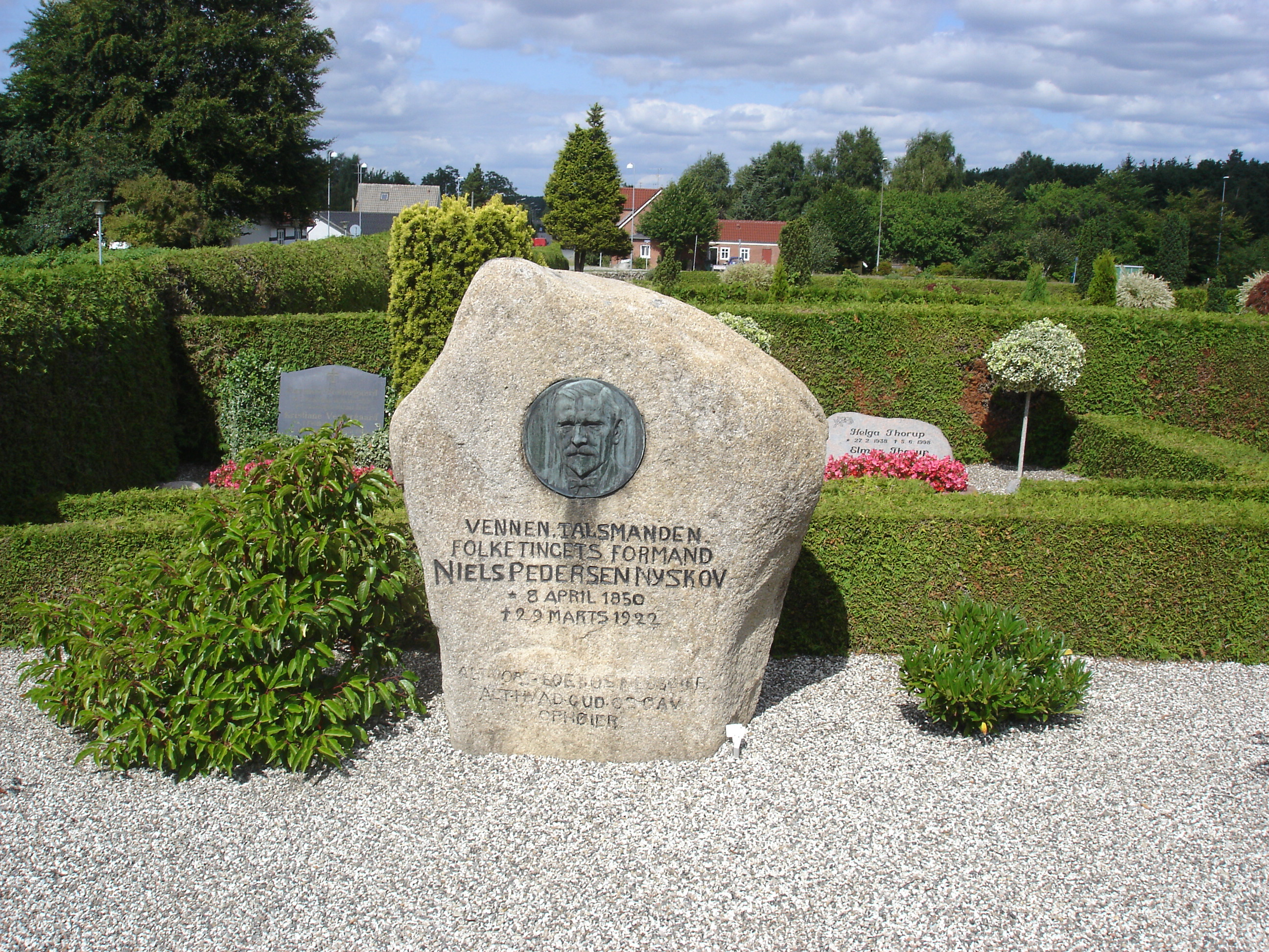 Niels Pedersen Nyskovs gravsten på Thorsager assistenskirkegård med portrætmedaljon, udført af Elias Ølsgaard